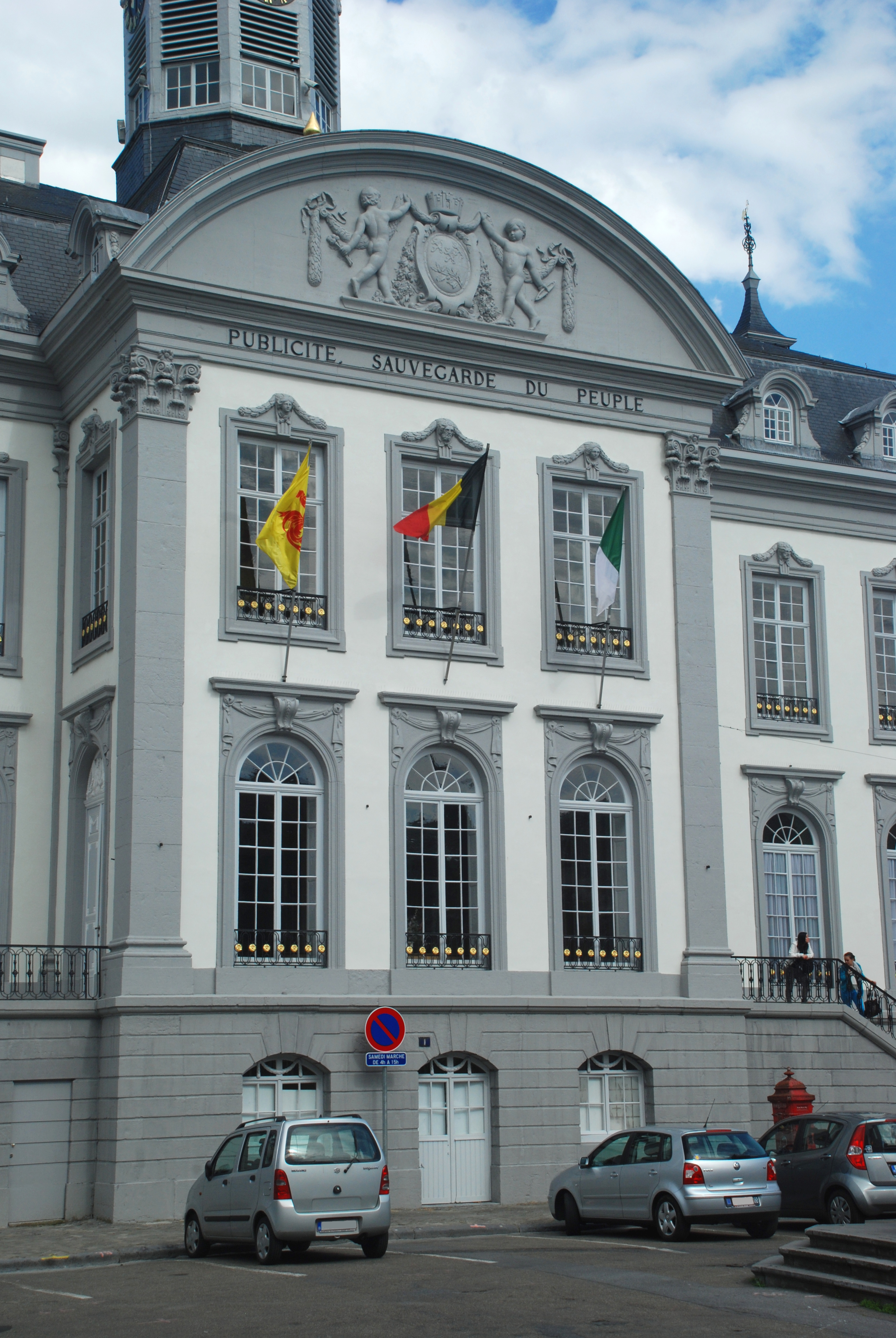 Belgique - Province de Liège - Hôtel de ville de Verviers